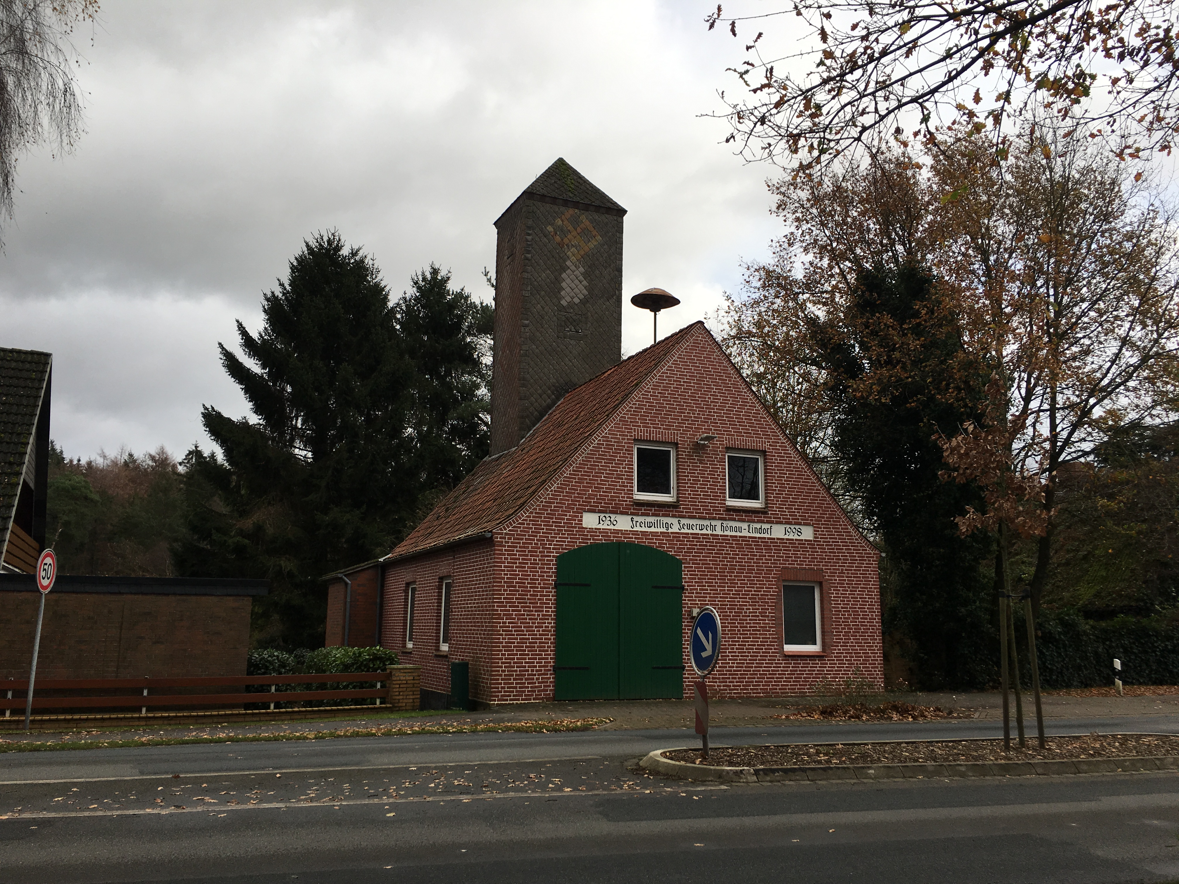 Oold Sprüttenhuus in Hönau-Lindörp